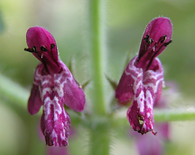 Wald-Ziest (Stachys sylvatica), aufgenommen am Schlittberg in Buseck